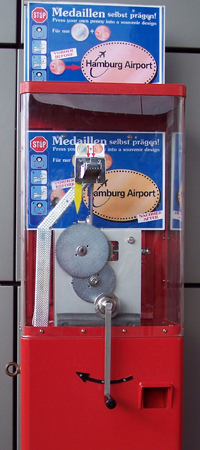 Manuelle Souvenir Prägemaschine